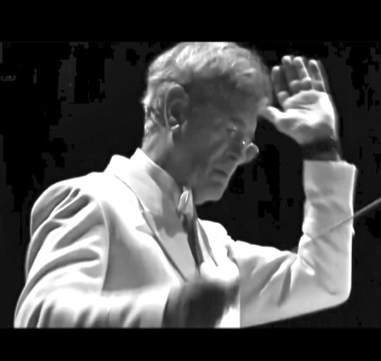 Alberto F. Conducting